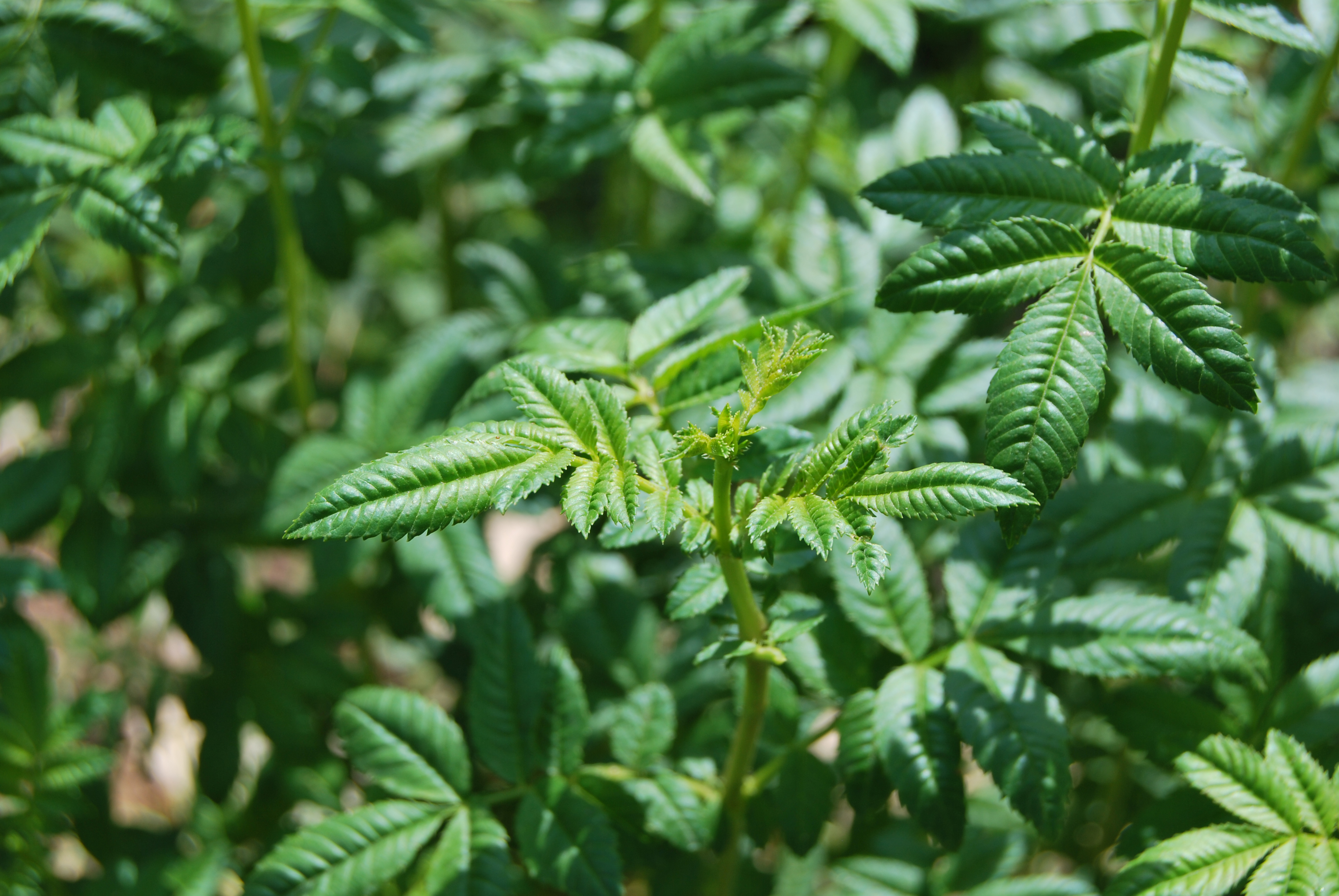 CHINCHO - (HOJAS DE): La hermosa planta de Chincho de la foto ha sido plantada por Carlos Laimito López (Cultivador, hortelano), natural de Chupaca - Huancayo - Perú.)Note: This description has been identified as biased or incorrect: The leaves have the shape of Tagetes elliptica rather than T. minuta..